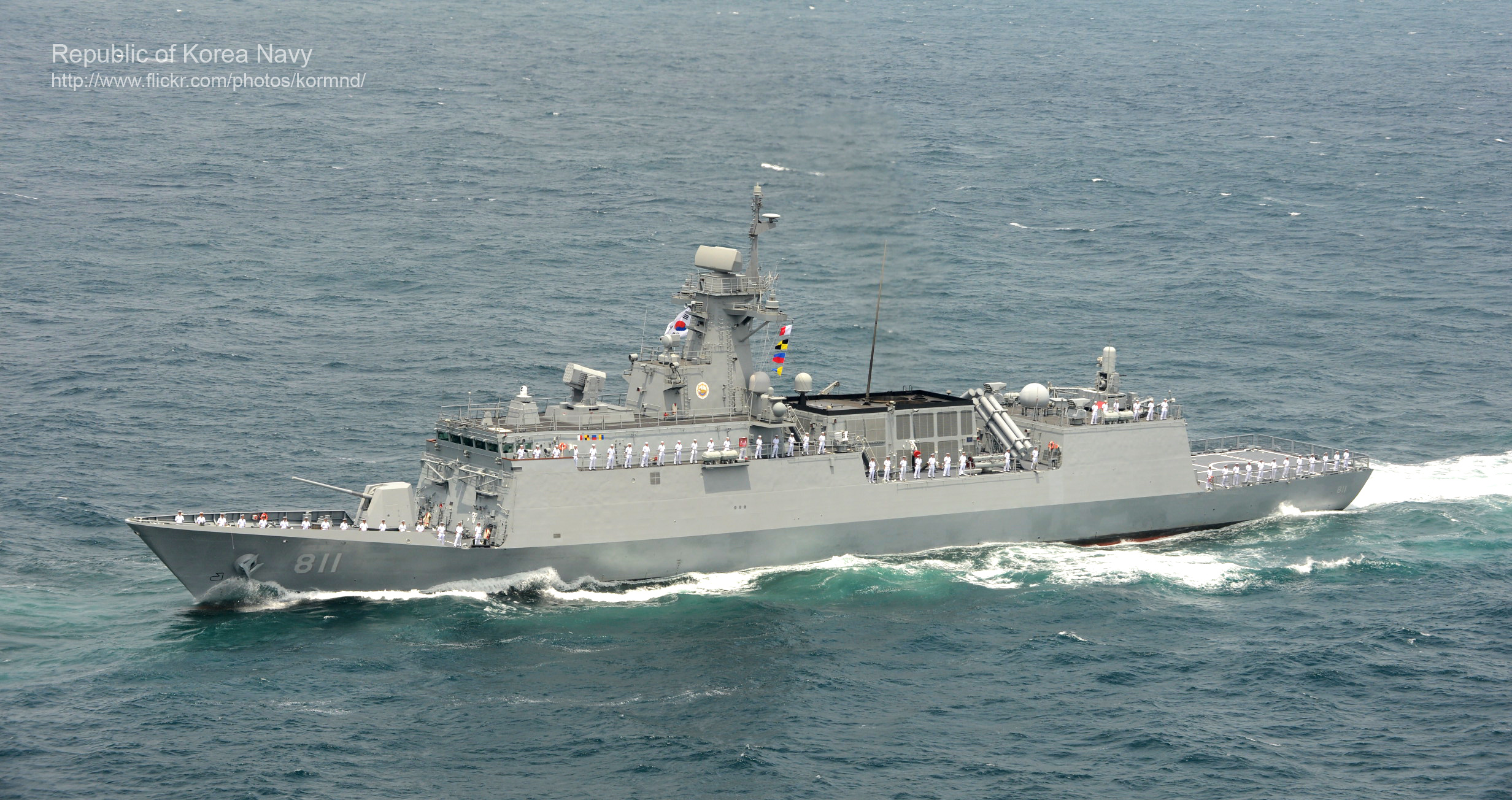 13. 6. 26 부산 인근 해역에서 이지스 구축함, 한국형 구축함, 호위함 등 함정 10여 척과 대잠초계기(P-3C), 대잠헬기(링스) 등이 해상사열과 화력시범을 선보였다. 촬영자 : 채홍강